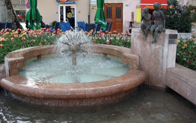 skulptura Prijateljstvo, poklon grada Kawasakija Rijeci